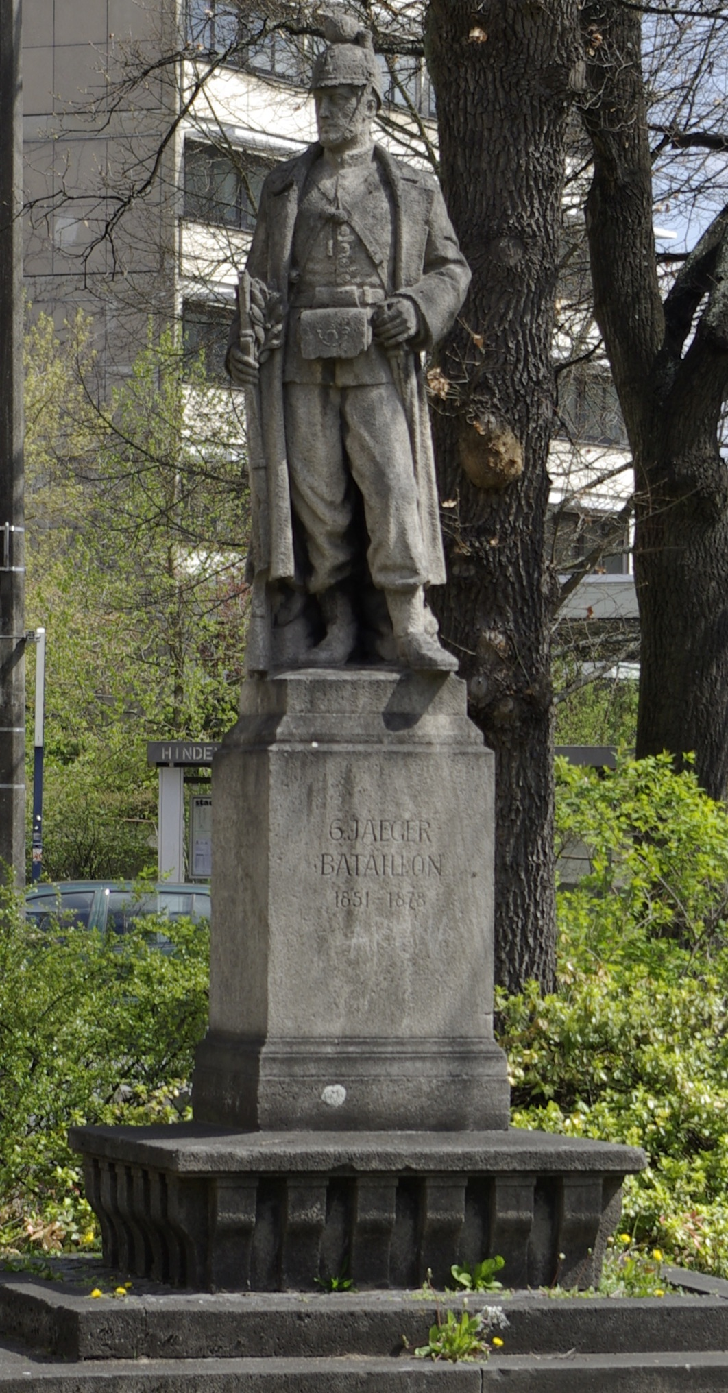 Das Jägerdenkmal in der Hindenburgstraße in Erlangen erinnert an das 6. Königlich Bayerische Jägerbataillon der Bayerischen Armee.